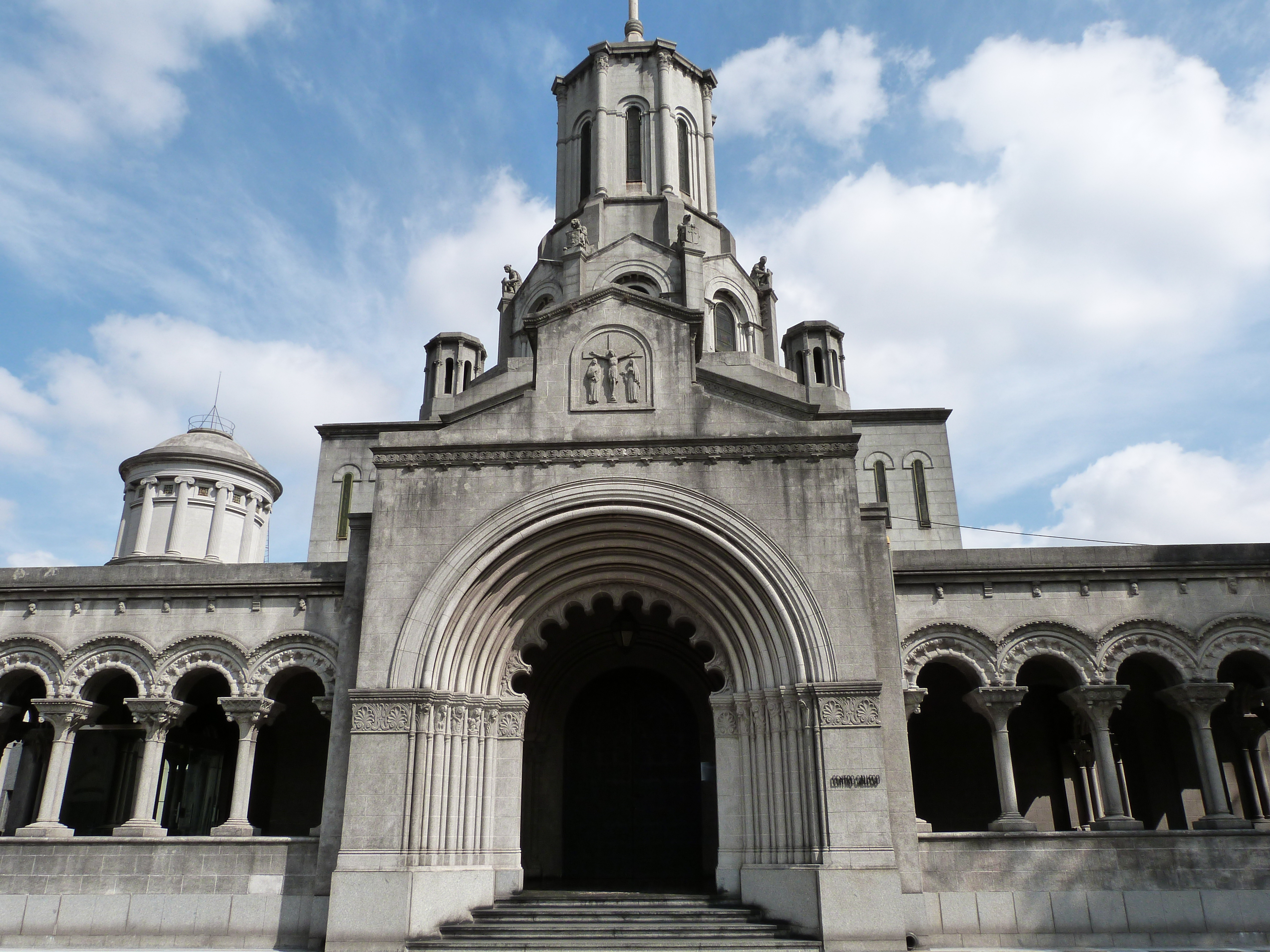 Fachada del panteón del Centro Gallego